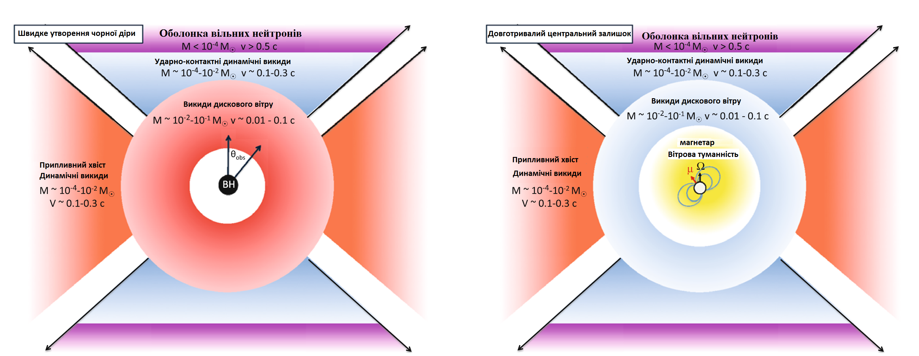 Різні компоненти викидів матерії із злиття двох нейтронних зір та залежність їх випромінювань кілонової від кута огляду спостерігача.